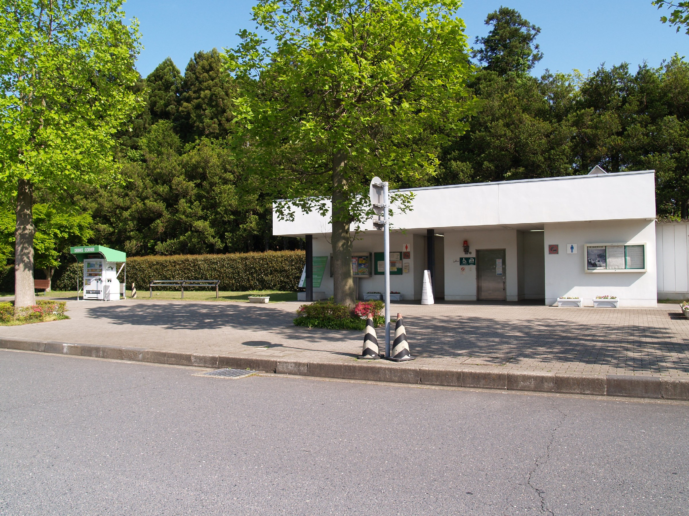 田野パーキングエリア上り線施設